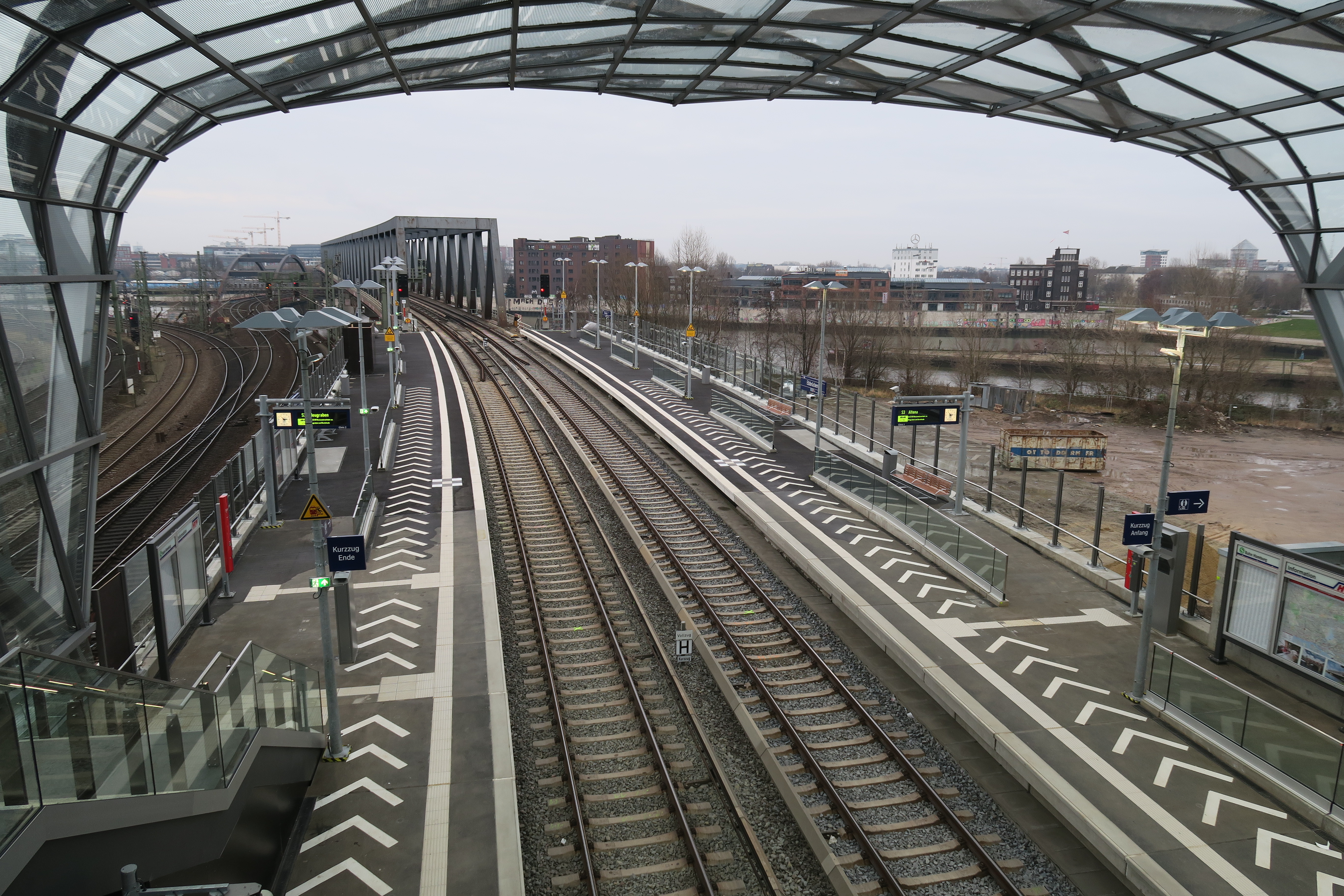 S-Bahnhof Elbbrücken: Blick vom Skywalk auf den nördlichen Bahnsteigabschnitt